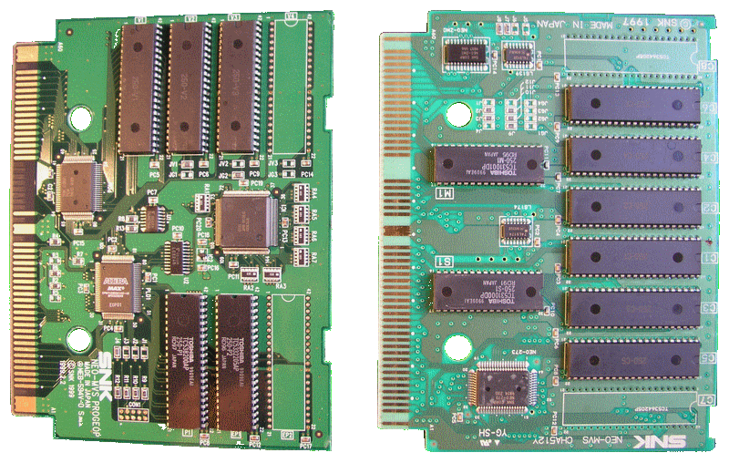 PCBs d'une cartouche Metal Slug X: Super Vehicle-001